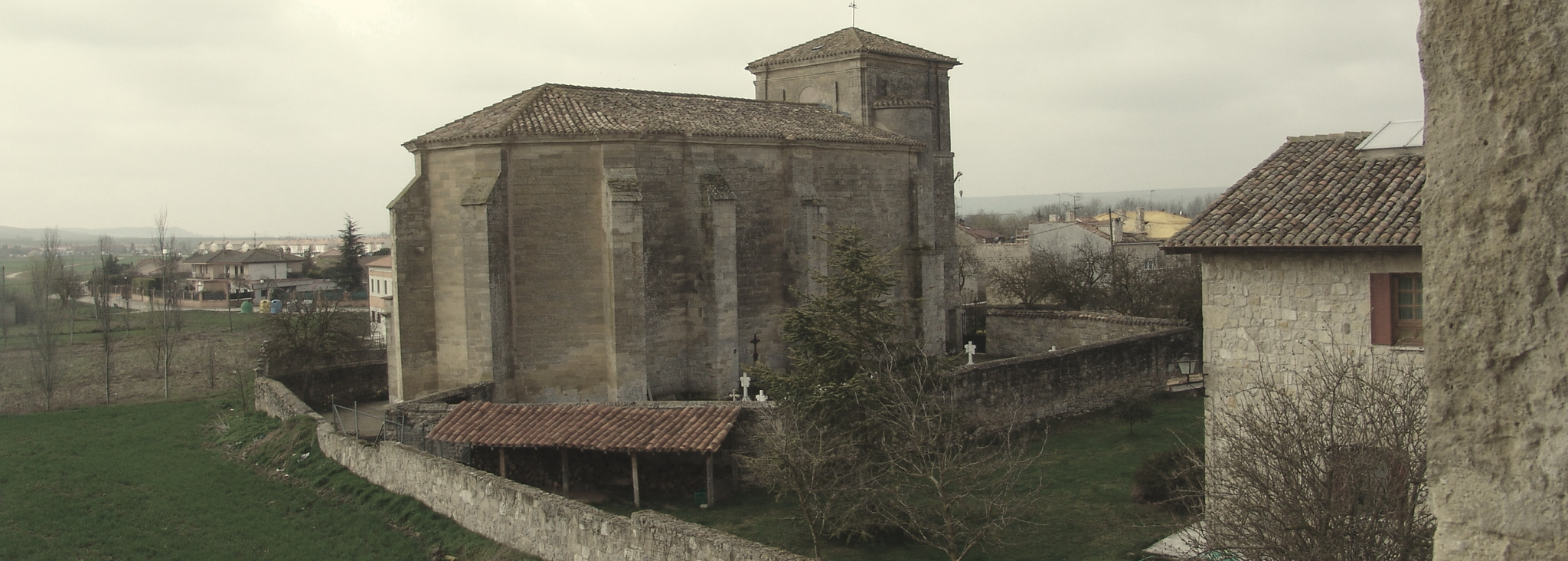 Iglesia de San Miguel, Vivar del Cid, Quintanilla-Vivar, provincia de Burgos, Castilla la Vieja, España.